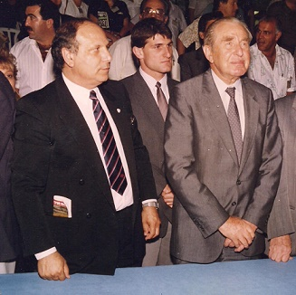 שאול סווירי ונשיא המדינה יצחק הרצוג ז"ל